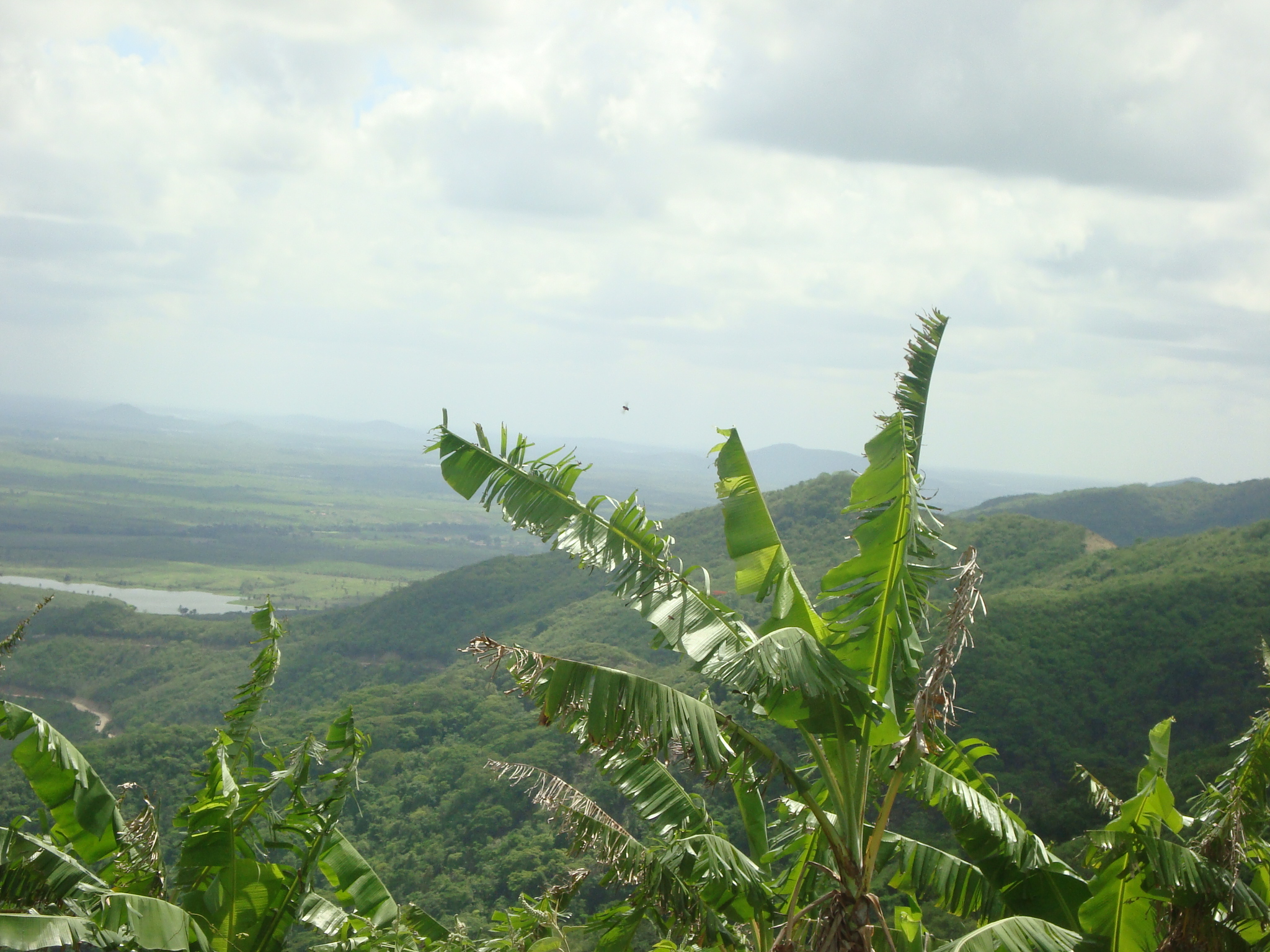 Palmácia